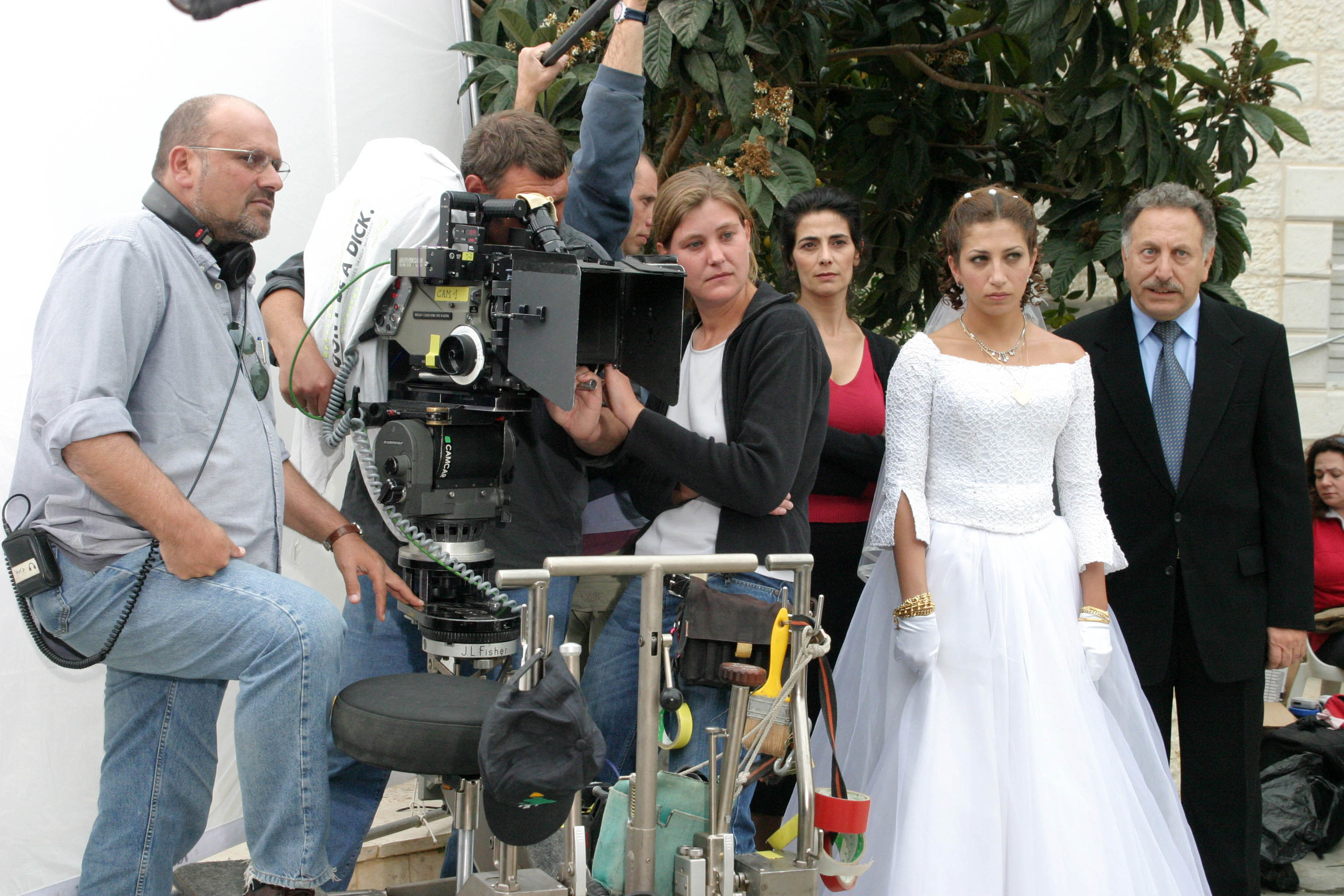 מכרם ח'ורי וקלרה ח'ורי, השמאלי ביותר ערן ריקליס, בסרט "הכלה הסורית"